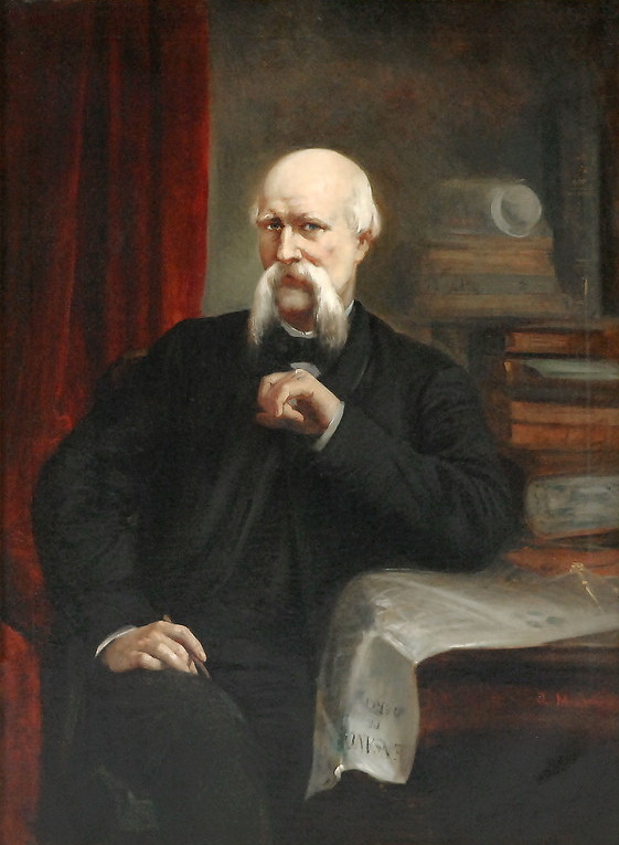 Retrato de Ildefons Cerdá (1815–1876).